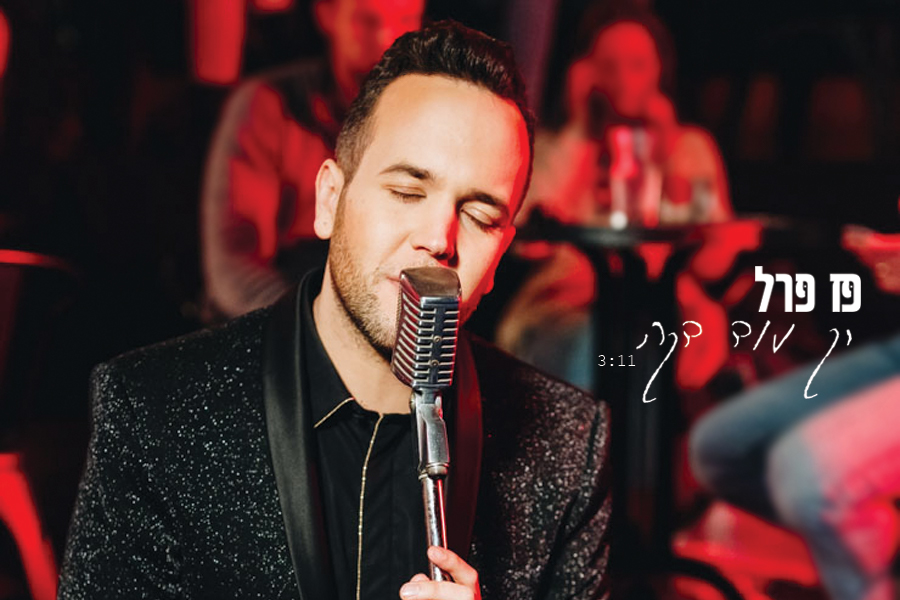 צילום: אולג בלואוסוב עיצוב: קסם פרל